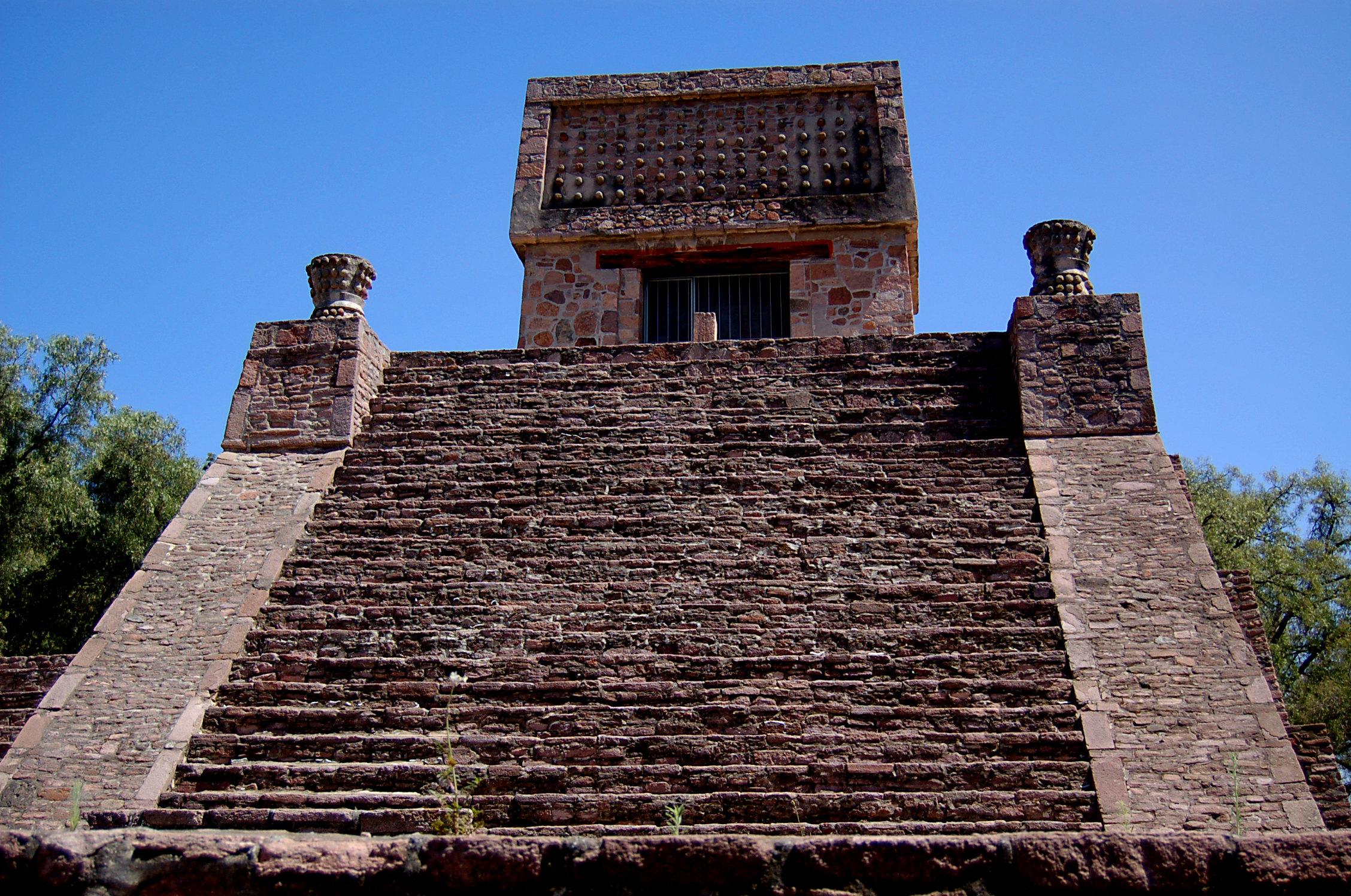 Pyramid at Santa_Cecilia_Acatitlan (Mexico)